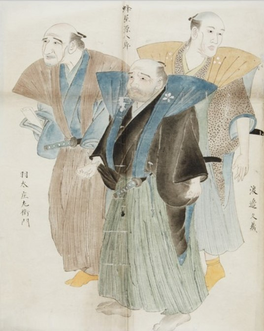 目付渡辺胤(右)、蜂屋成定(中央)、羽太正養(左)の肖像。